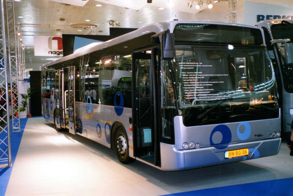 Deze Ambassador 200 van Berkhof werd van 12 t/m 19 september 2002 gepresenteerd op de Internationale Automobil-Ausstellung (IAA) in Hannover